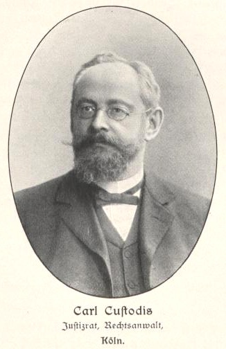 Karl Custodis (1844-1925), Rechtsanwalt und Reichstagsabgeordneter (Zentrum)